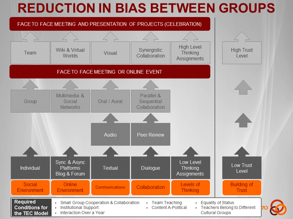 מודל tec - רכיבים מרכזיים במודל והצגת דרך העבודה לבניית אמון